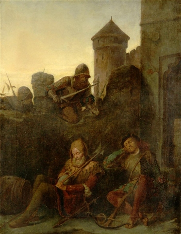 Karel Javurek - Überfall auf die schlafende Wache